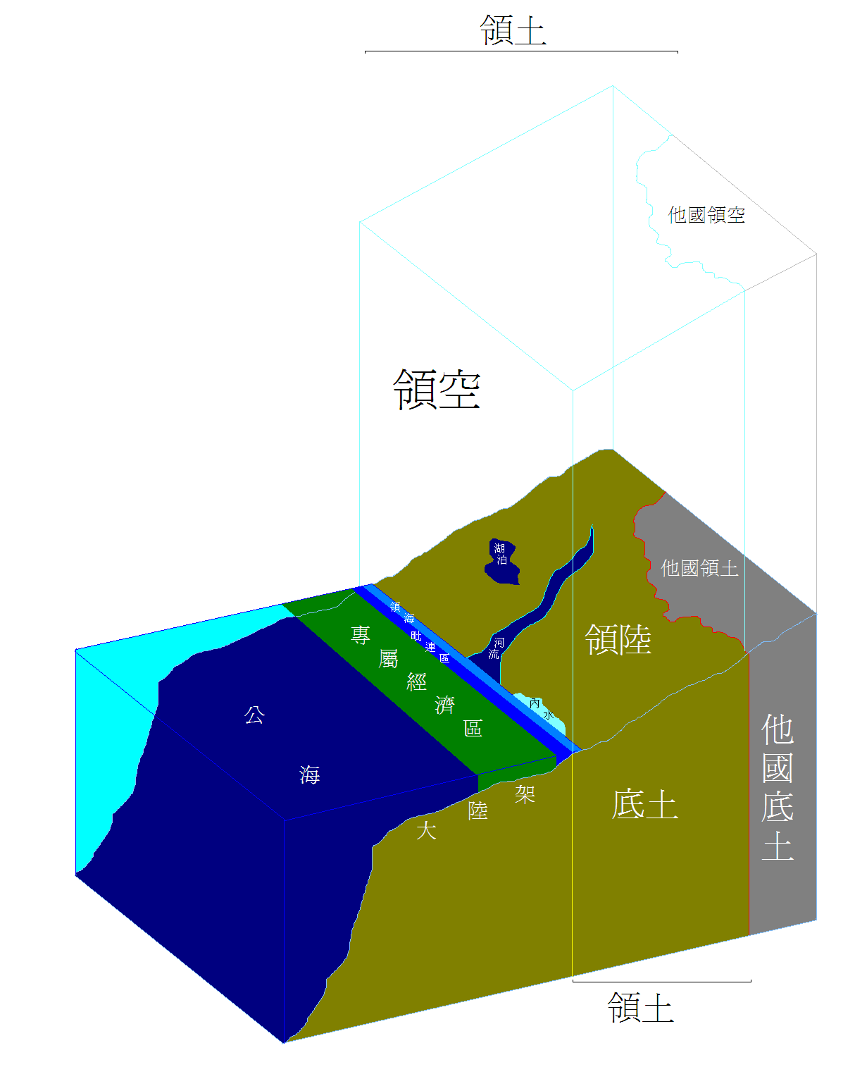 領土詳細